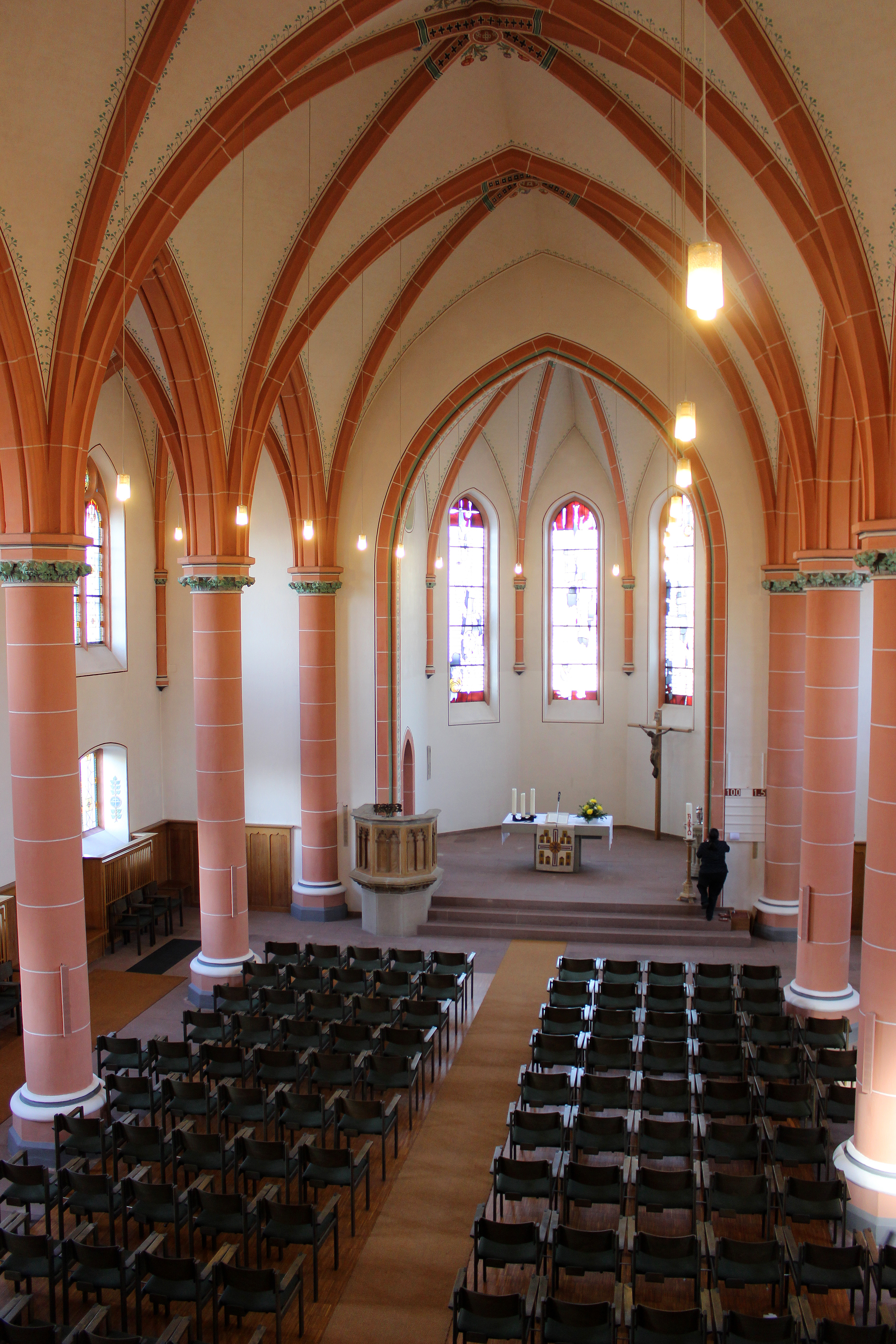 Blick ins Innere der evangelischen Kirche Elversberg, Landkreis Neunkirchen, Saarland